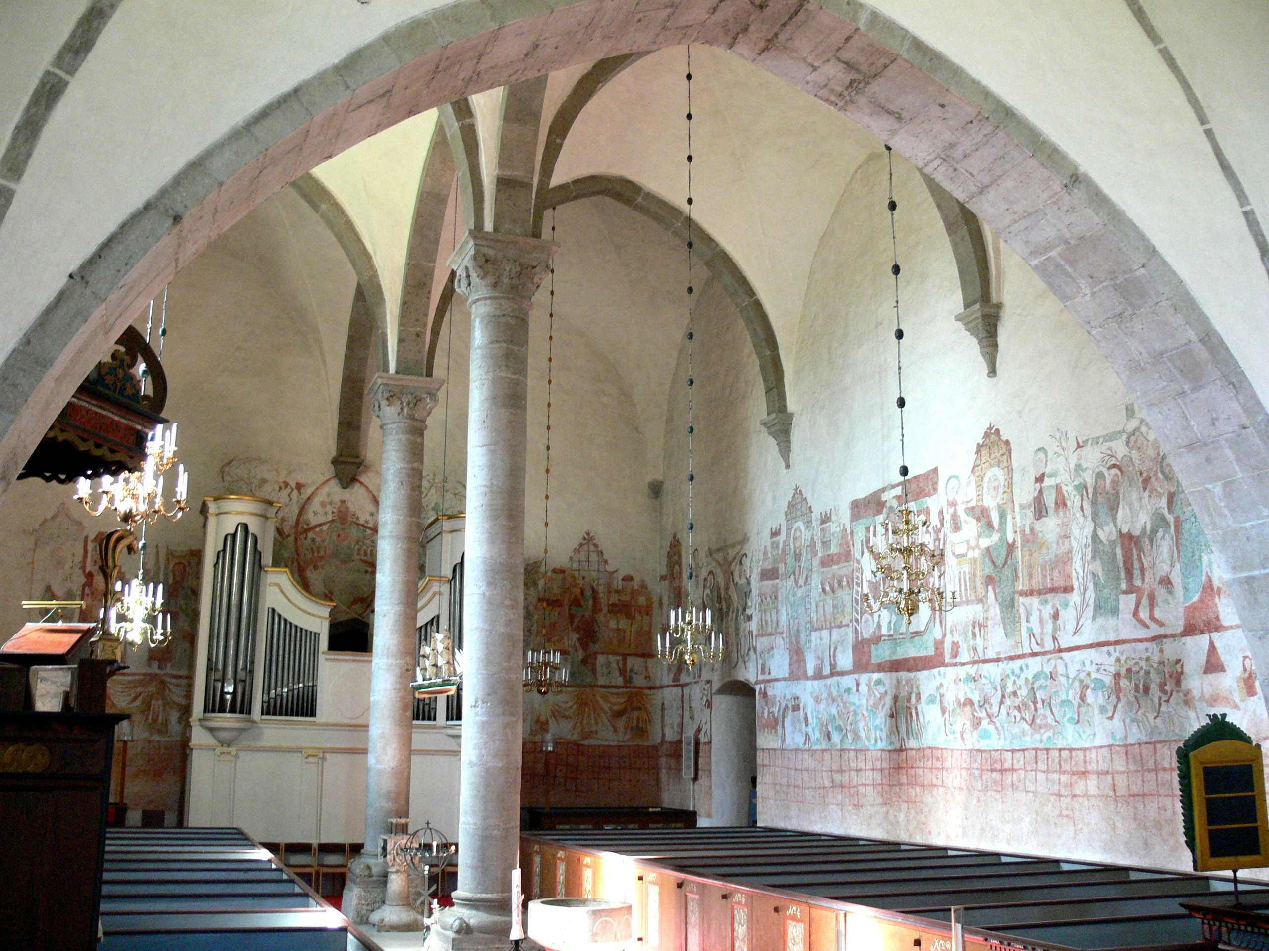 Bunge kyrka auf Gotland. Kirchenschiff